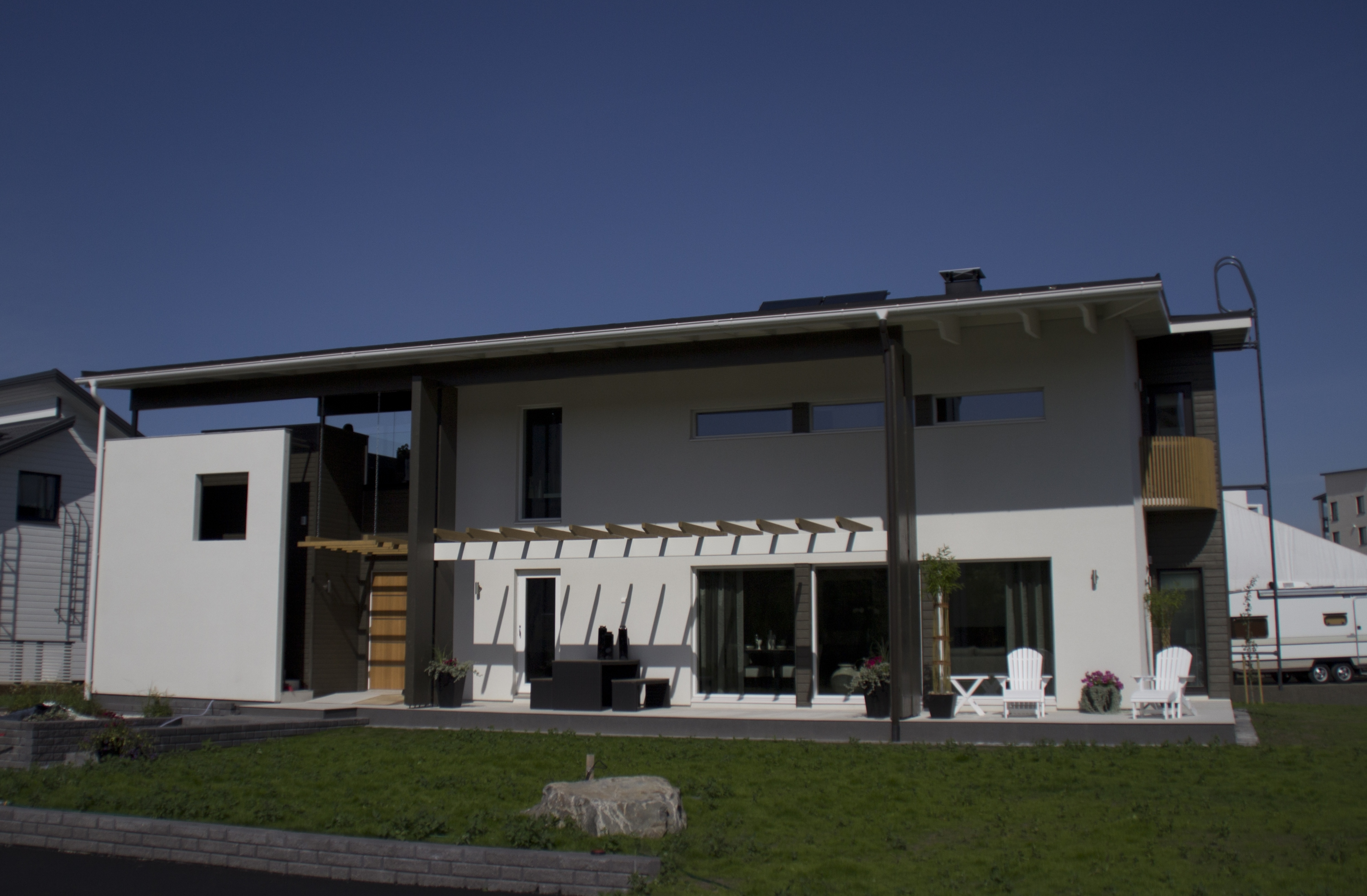 Kreivi-Talo Merilinna Kokkolan Asuntomessuilla 2011